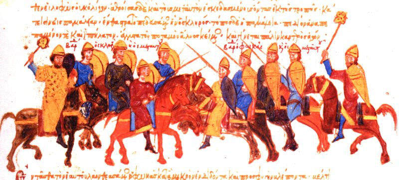 Battle (Bardas Skleros ag. Bardas Phokas)